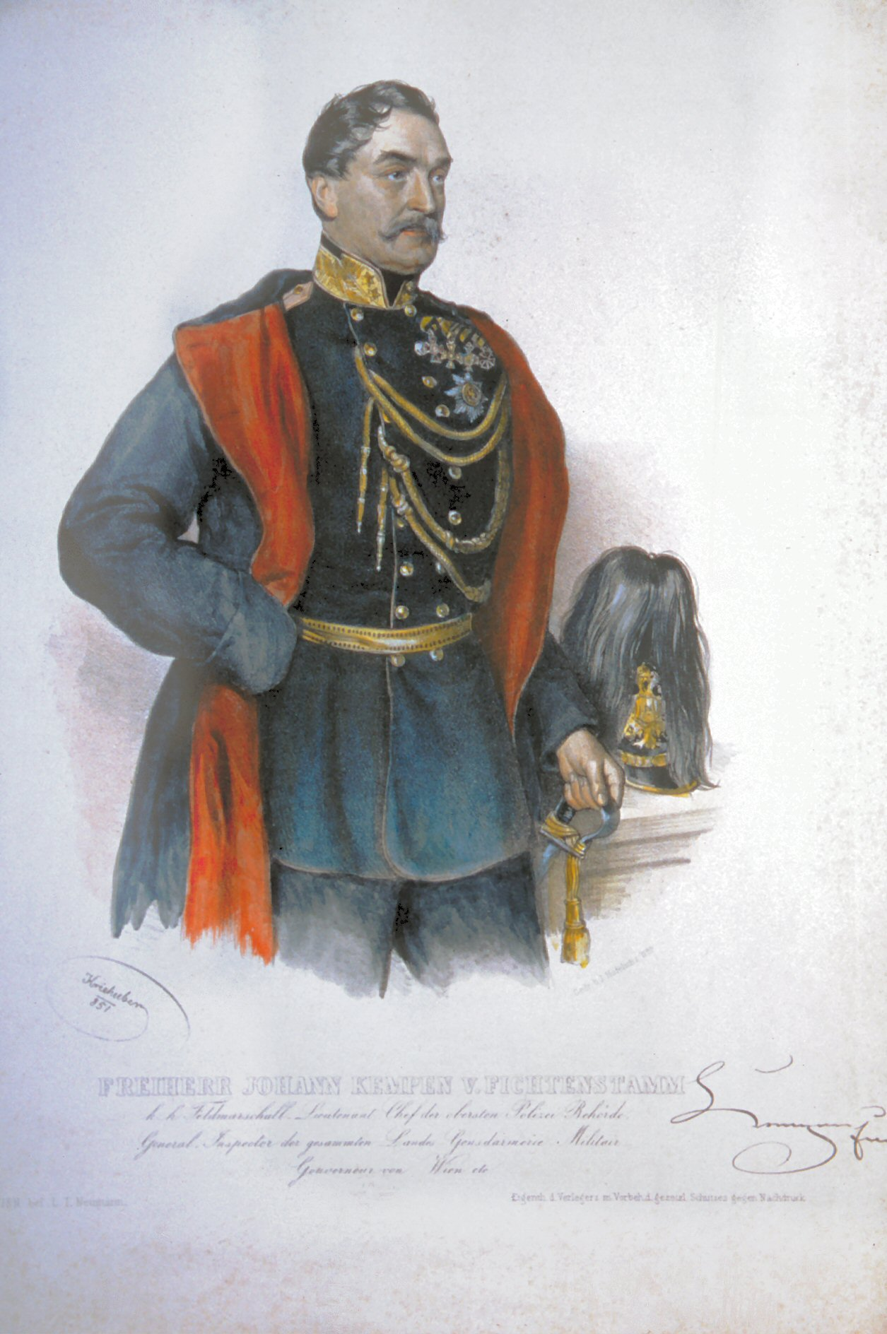 Johann Kempen von Fichtenstamm (1793-1863), k. k. Feldzeugmeister.